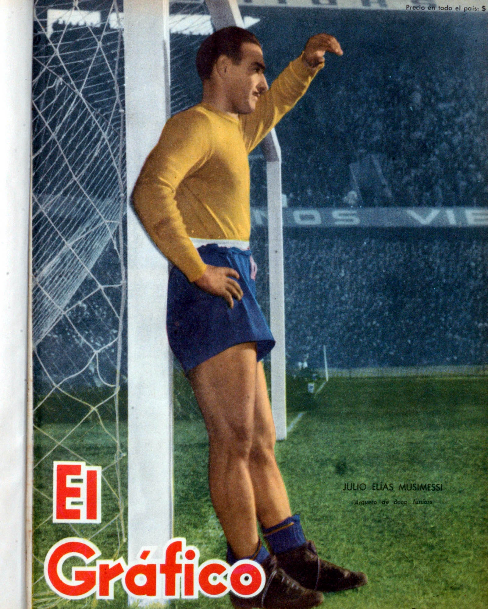 El Gráfico del 19 de Noviembre de 1954. Edición 1841.